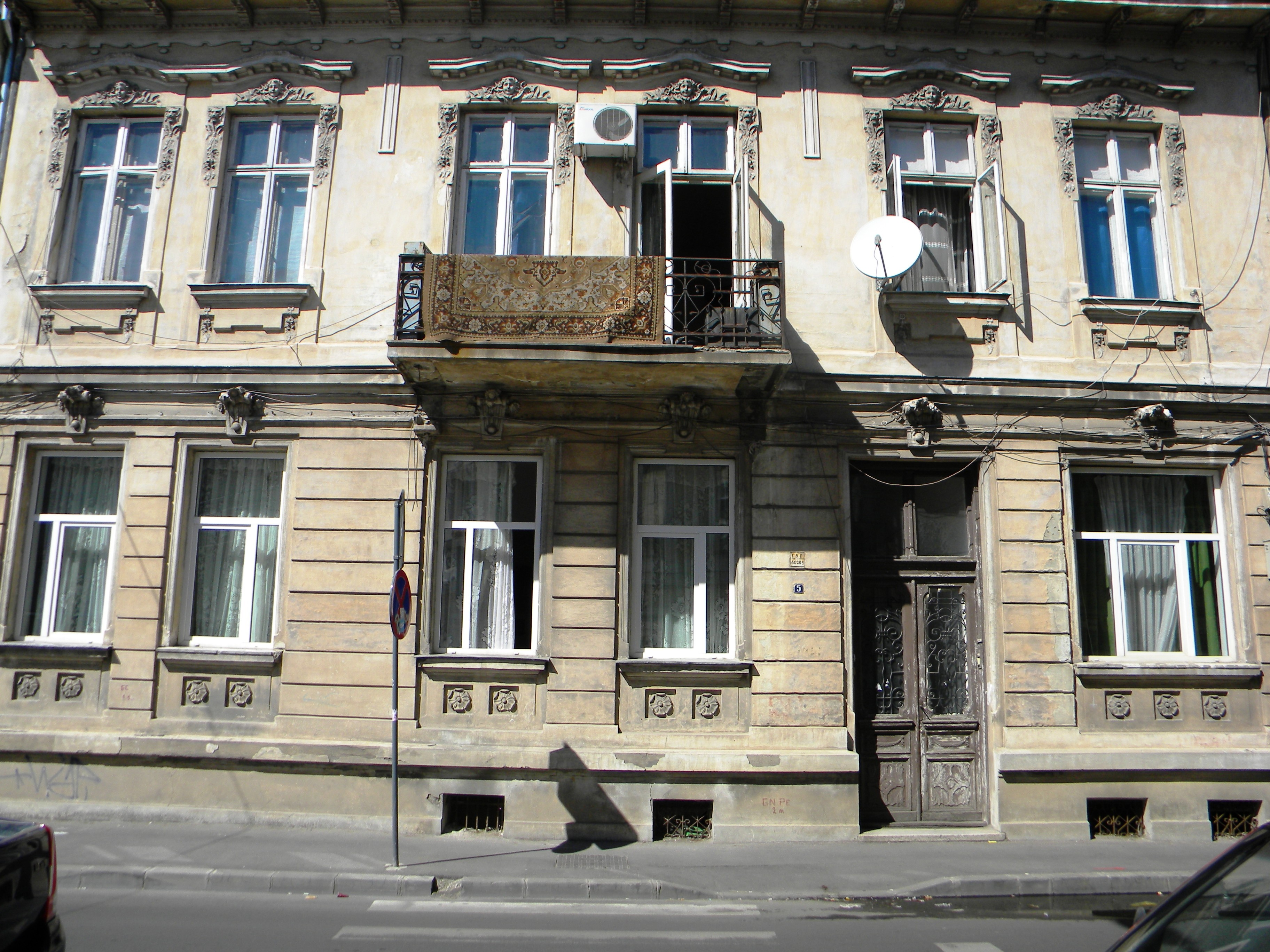 Bucuresti, Romania, Casa pe Str. Coltei nr. 5, sect. 3